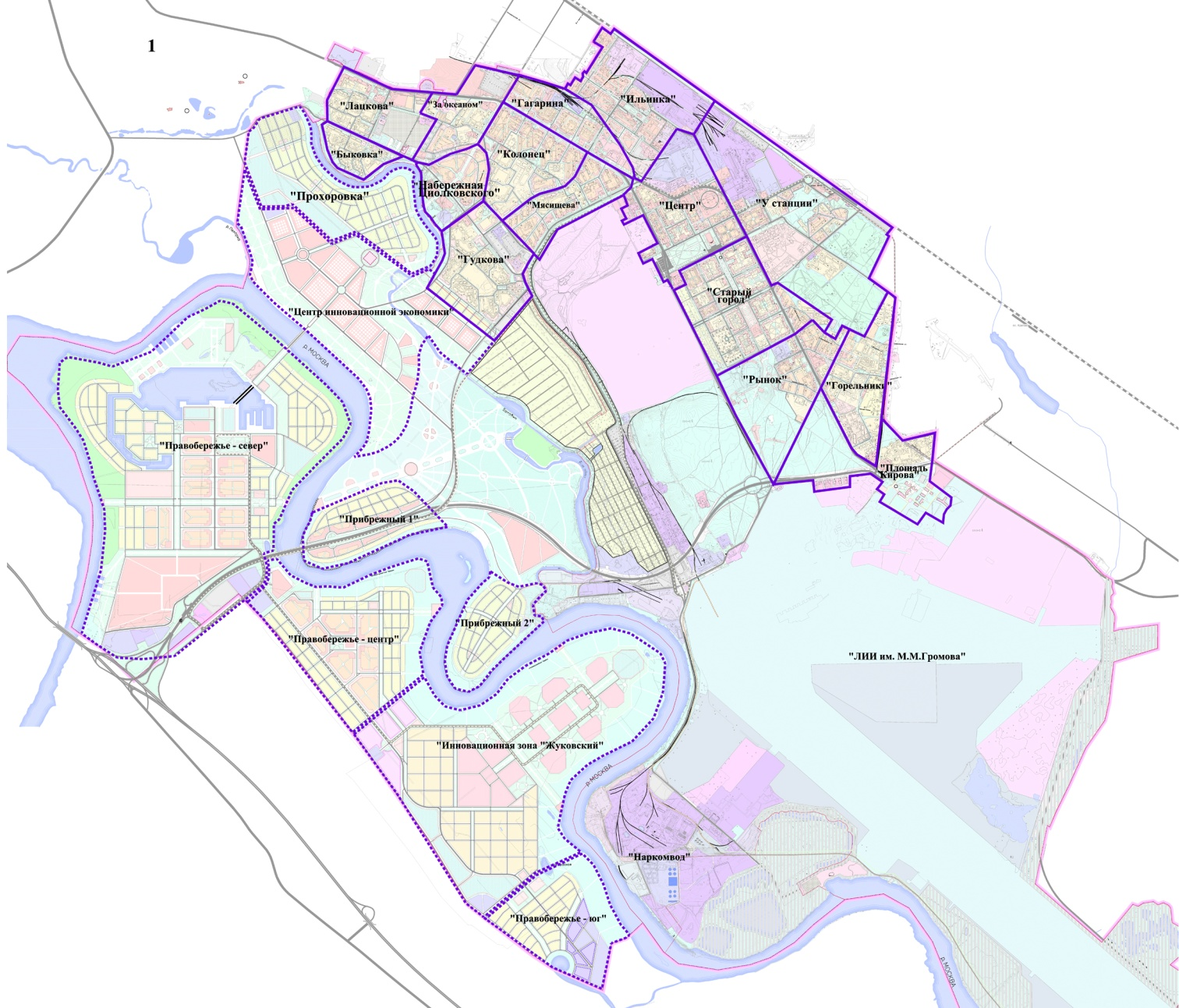 Схема существующих и перспективных планировочных районов г. Жуковского